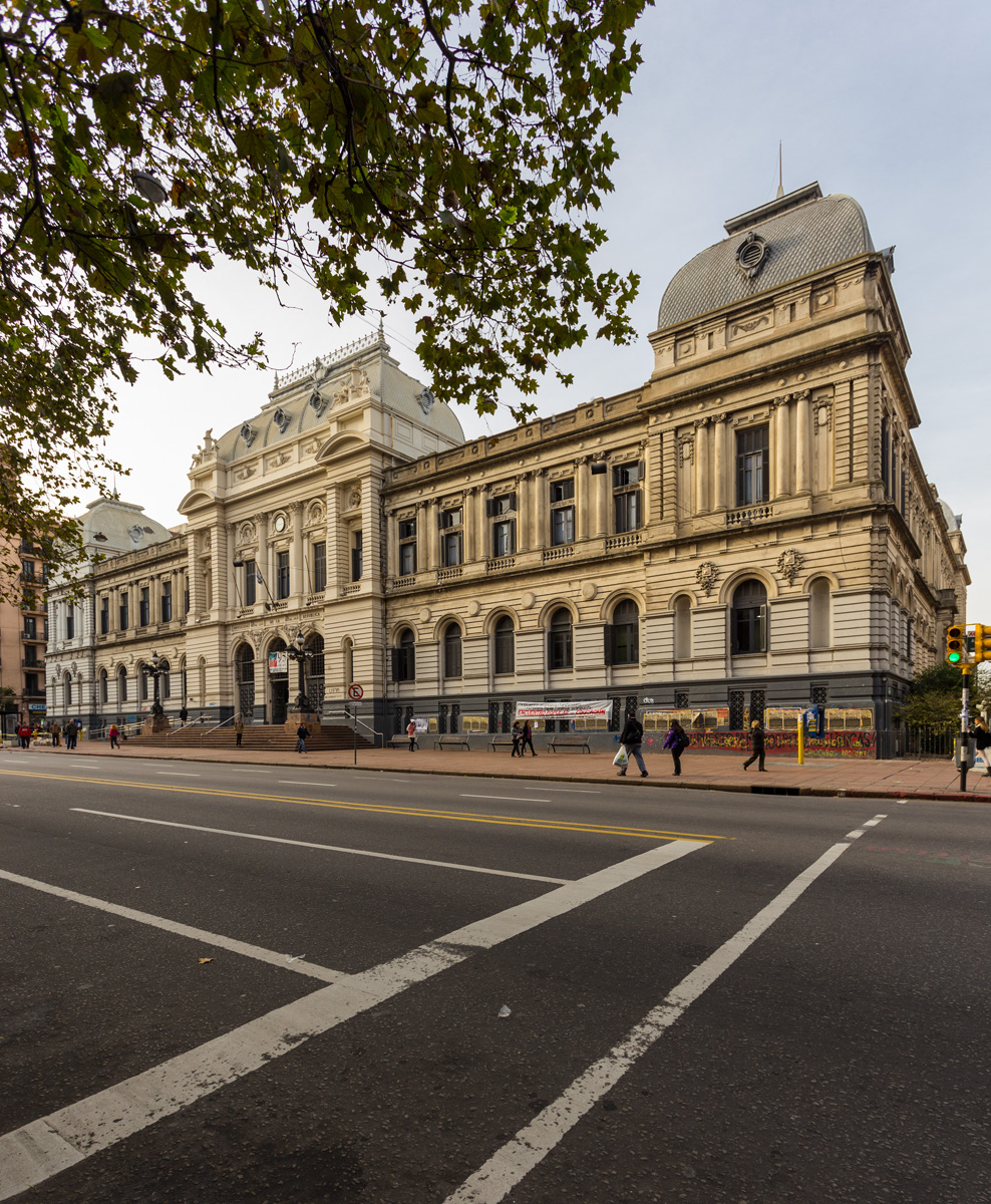 Universidad de la República. Ubicada en el departamento de Montevideo